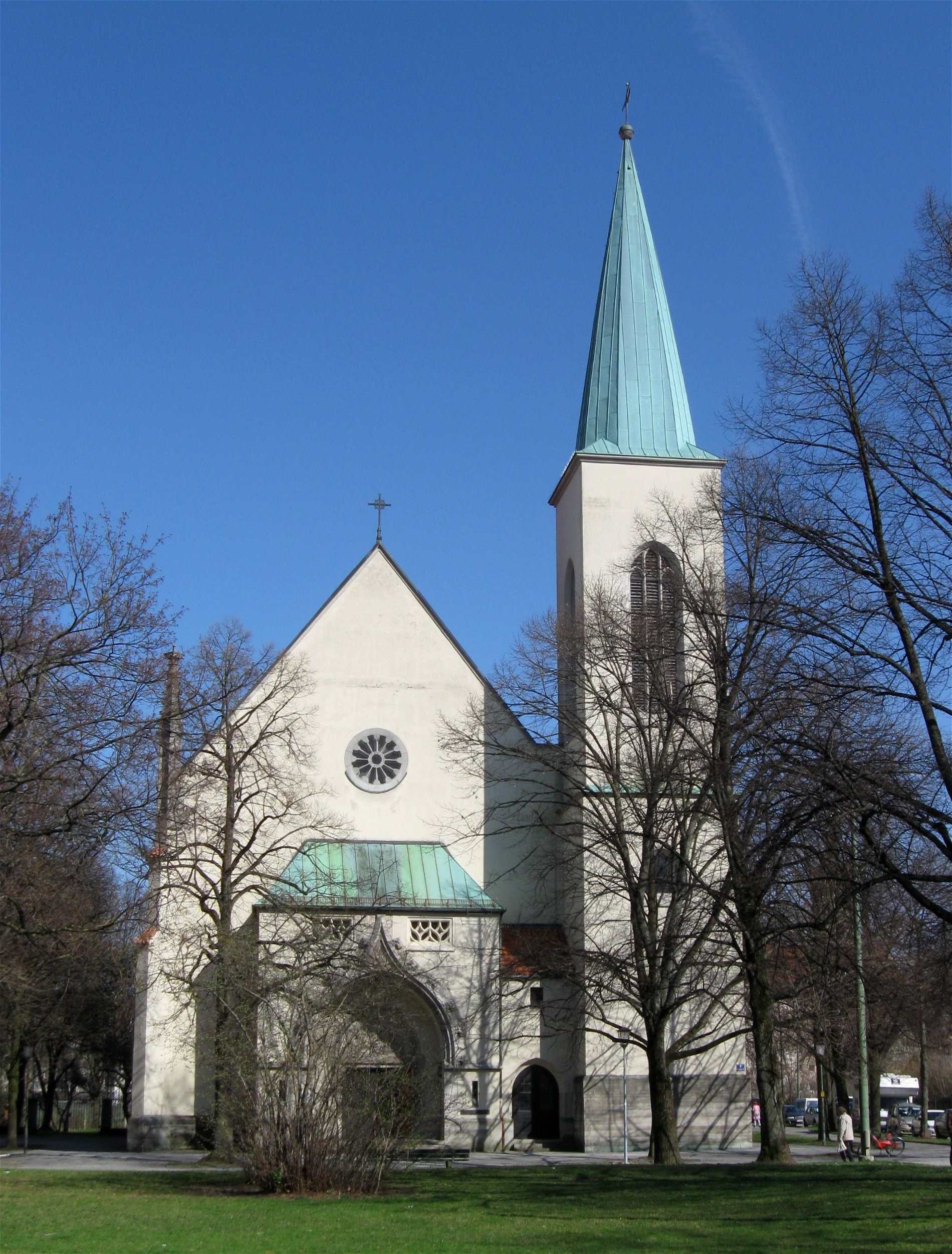 Evangelisch-lutherische Christuskirche, Dom-Pedro-Platz 4 in Neuhausen, Stadtteil von München, Bayern, Deutschland. Die Kirche wurde im neugotischen Stil mit Spitzturm 1899-1901 von Heilmann und Littmann nach Plänen von Erich Göbel erbaut; 1953 vereinfachter Wiederaufbau durch Bruno Biehler.